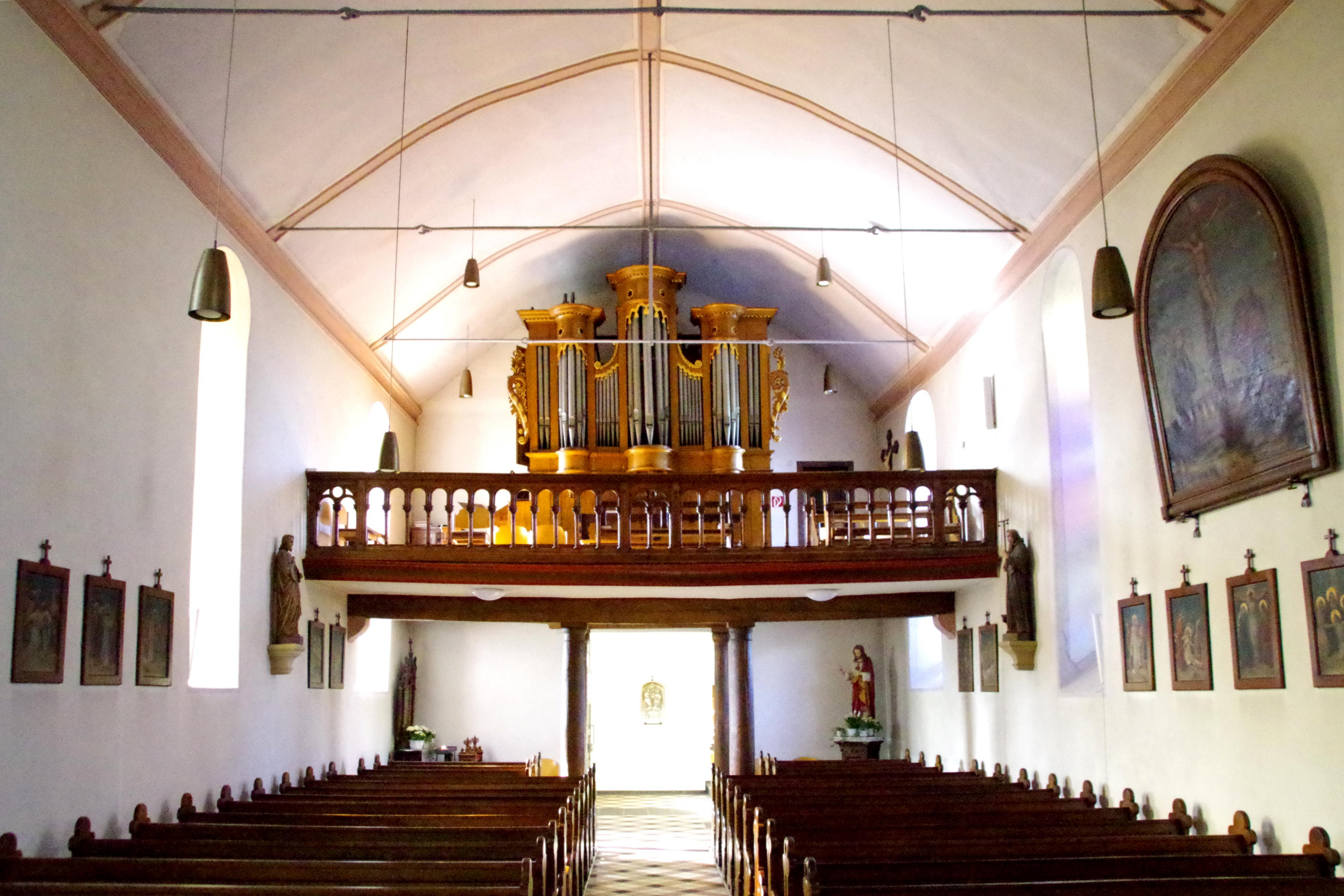 St. Peter und Paul (Blankenheimerdorf), Blick zur Orgelempore